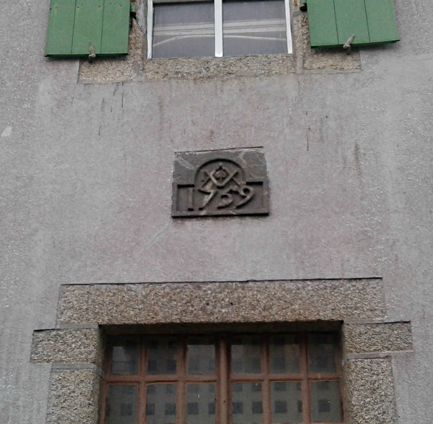 Linteau de 1759, maison du maître-serrurier Charles Bruslé, Recouvrance, Brest, Finistère, France